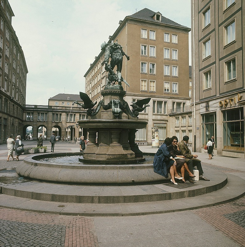 Original image description from the Deutsche Fotothek Gänsediebbrunnen. Bronze (1878-1880; R. Diez). Dresden, Weiße Gasse